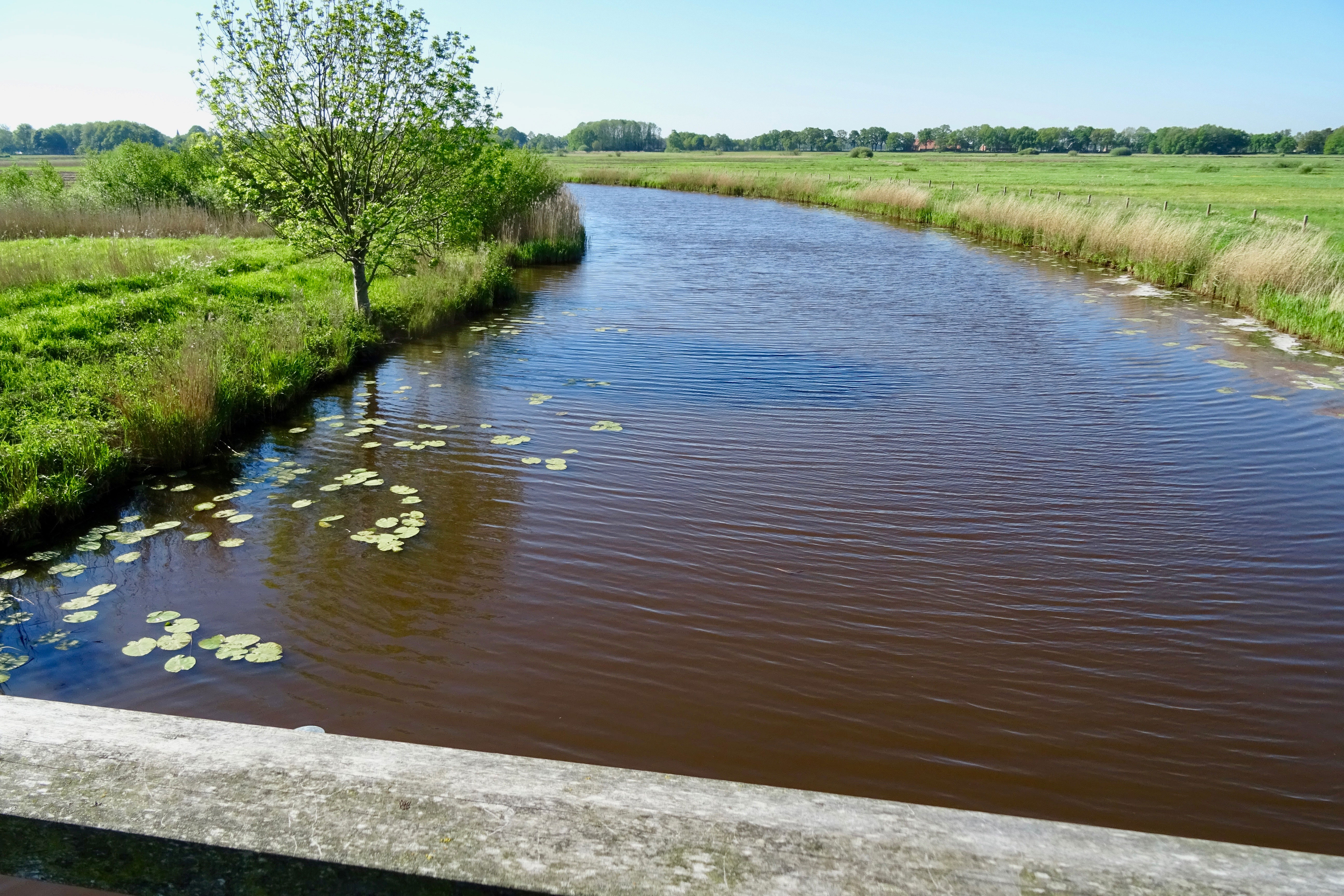 De Westerwokdse Aa